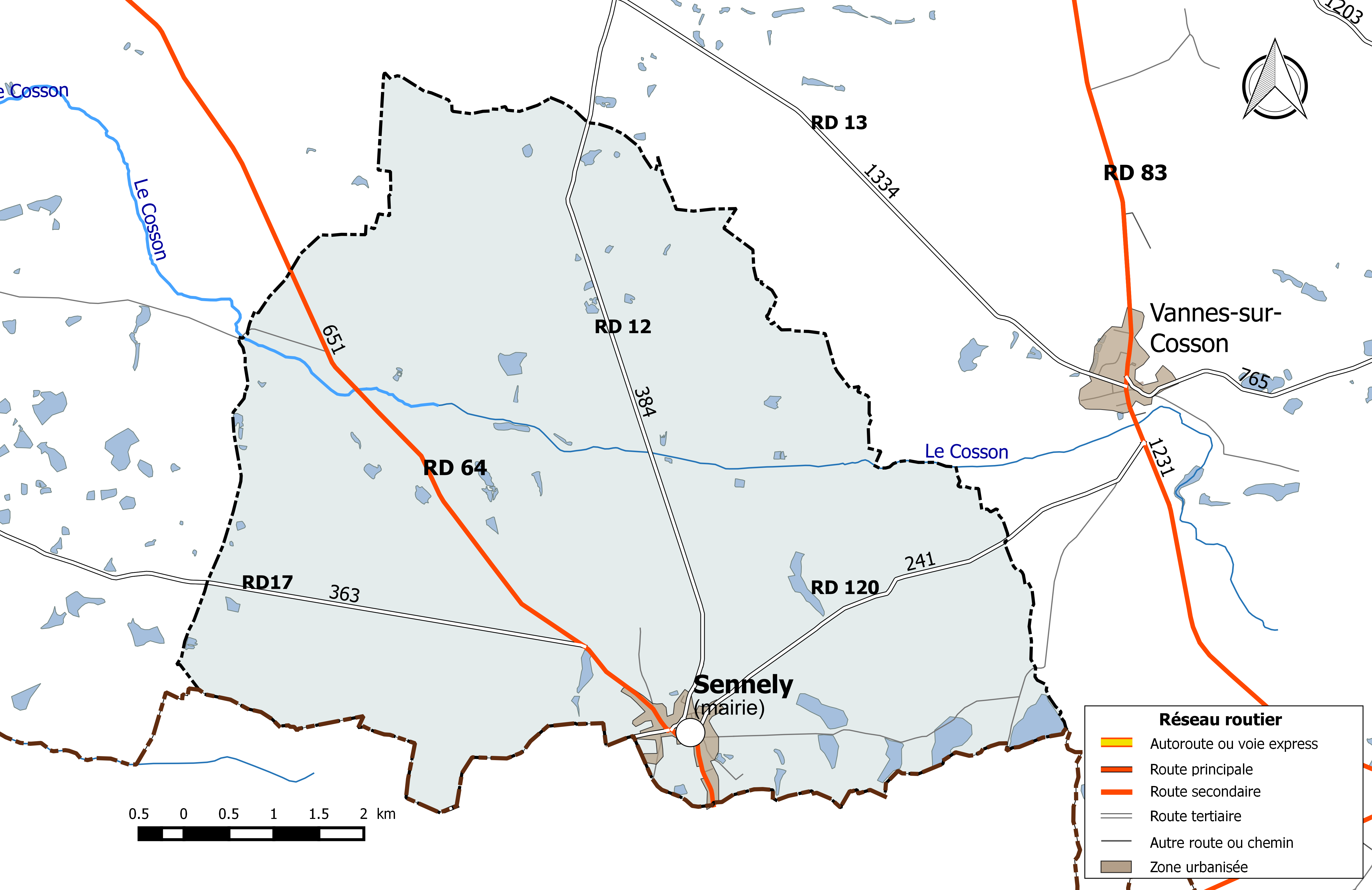 Carte du réseau routier de la commune de Sennely.